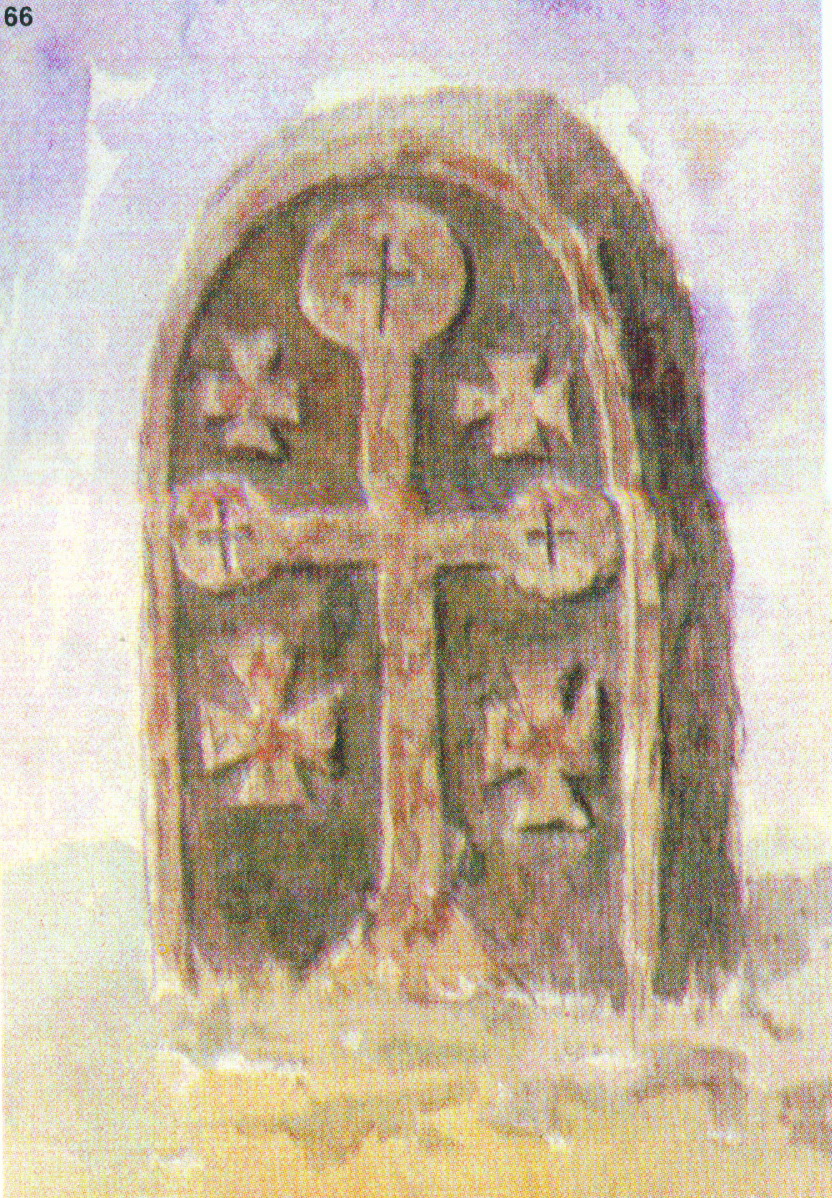 66. Надгробна плоча с кръст, из гробищата на с. Ребърково, Врачанско. Издялана от сив варовит камък преди 30-40 години; по средата е изрязан четирикрилен кръст; горните три крила завършват с по една кръгла плоча с гравирано кръстче; долното крило - с триъгълна подставка между ъглите; гдето се пресичат крилата, са изсечени четири равнокрилни кръстчета, крилата на които се разширяват навън; фонът, върху който лежат кръстовете, е заобиколен с релефна 2 см широка ивица, висока колкото тях. Размери: 63x35x8 см, скицирана през юни 1916 г. (Т. 2, обр. 10.)